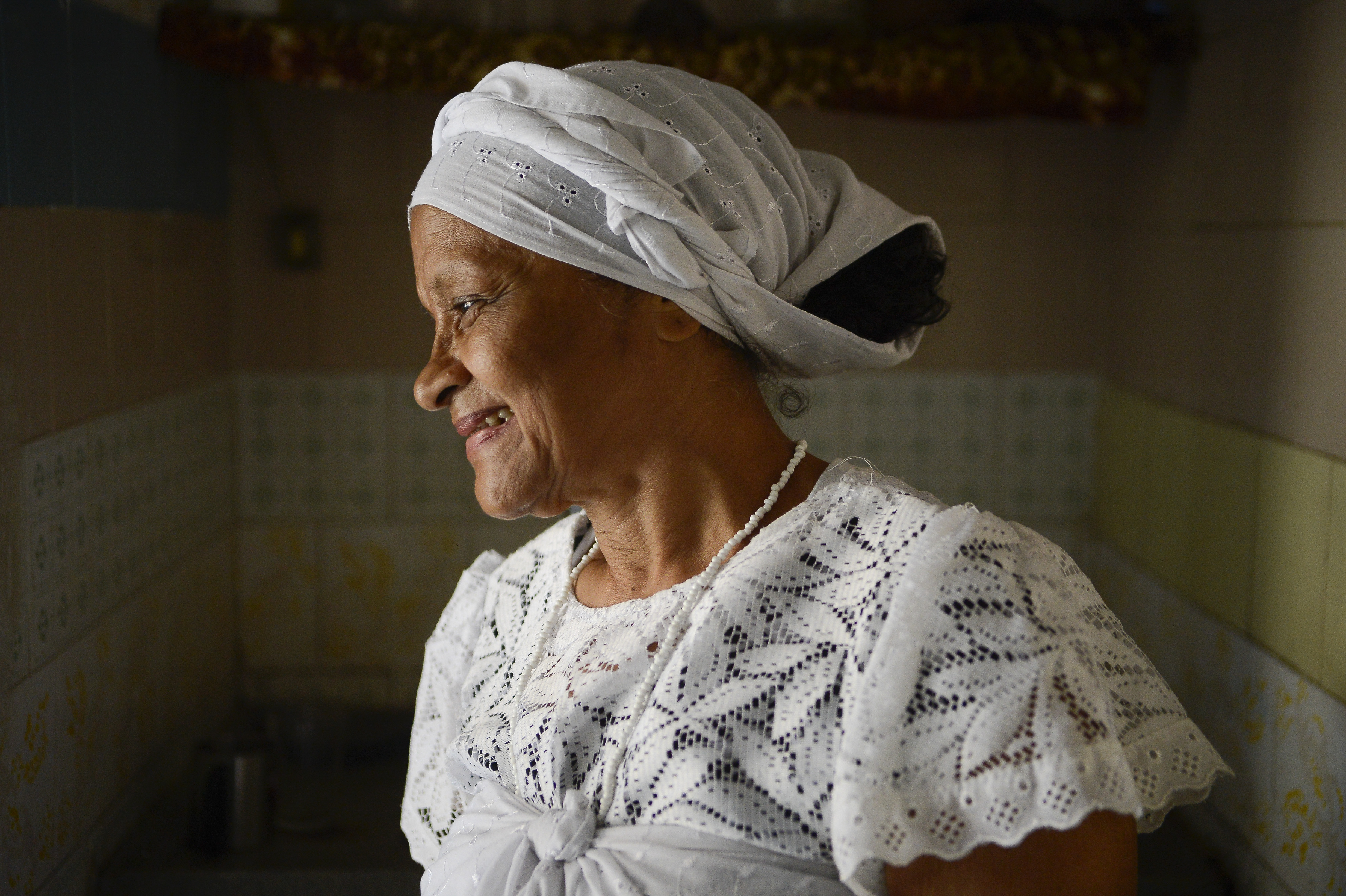 Rio de Janeiro - Maria da Guia, médium do terreiro Tenda Espírita Vovó Maria Conga de Aruanda, a primeira instituição cadastrada no mapa de terreiros de Ubanda da cidade do Rio de Janeiro (Tânia Rêgo/Agência Brasil)